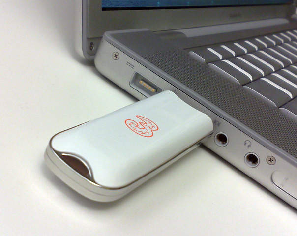 Huawei E169G White